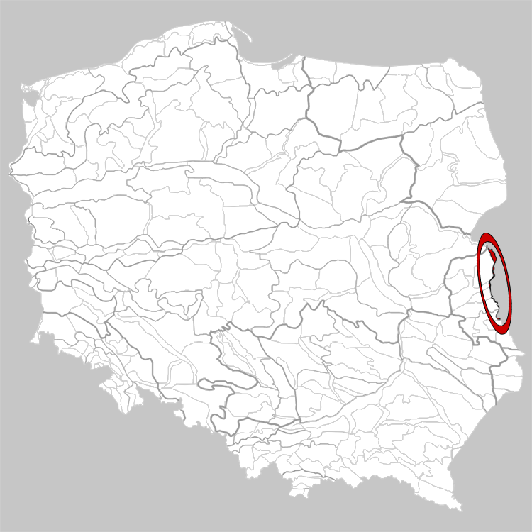 Physico-geographical regionalization of Poland Mezoregion 845.17 Brest Polesie Regionalizacja fizycznogeograficzna Polski Mezoregion 845.17 Polesie Brzeskie